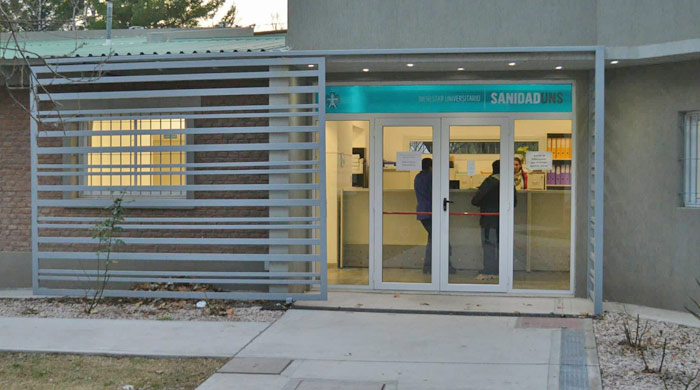 Sanidad UNS